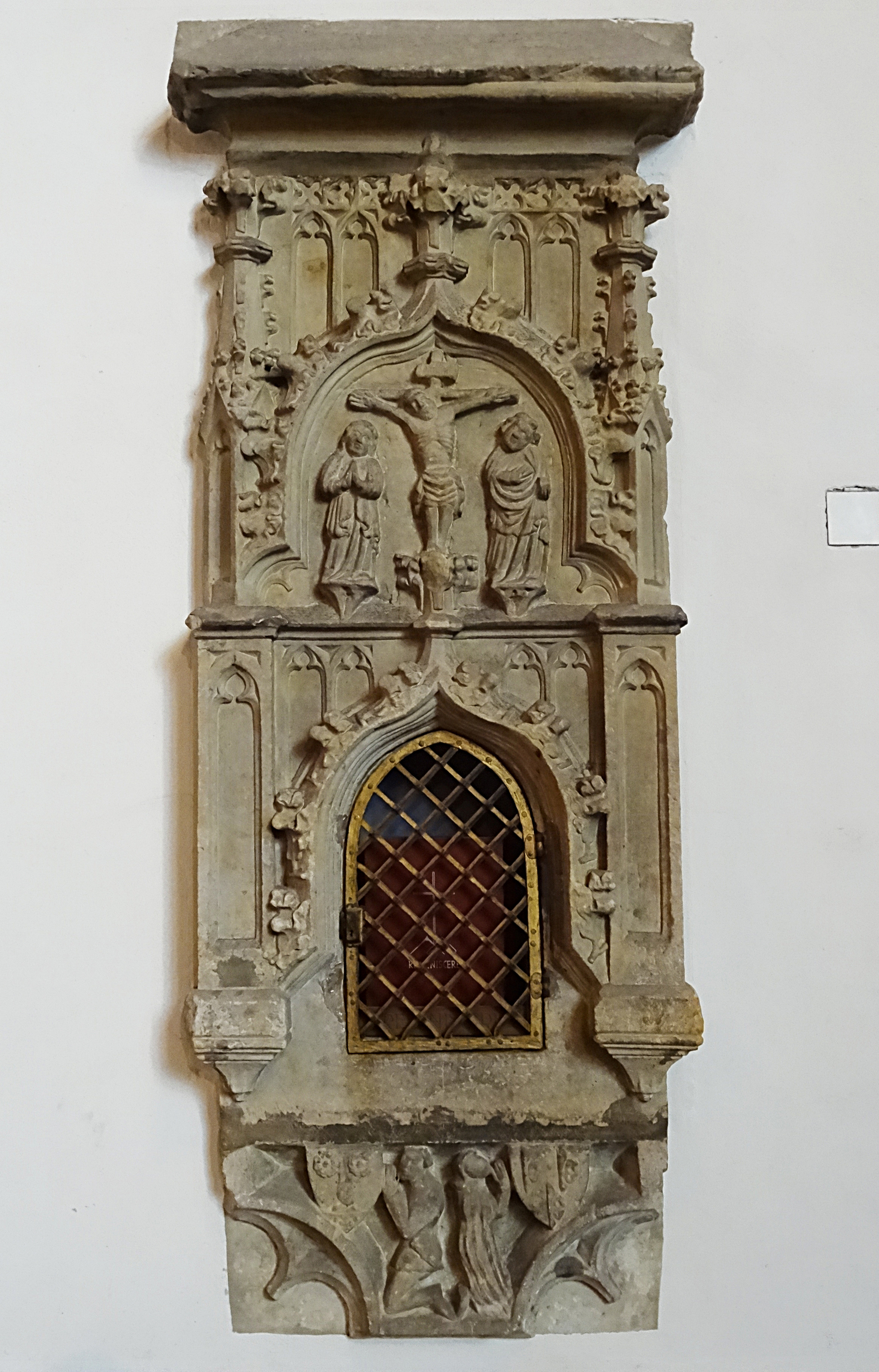 Thomaskirche (Erfurt)